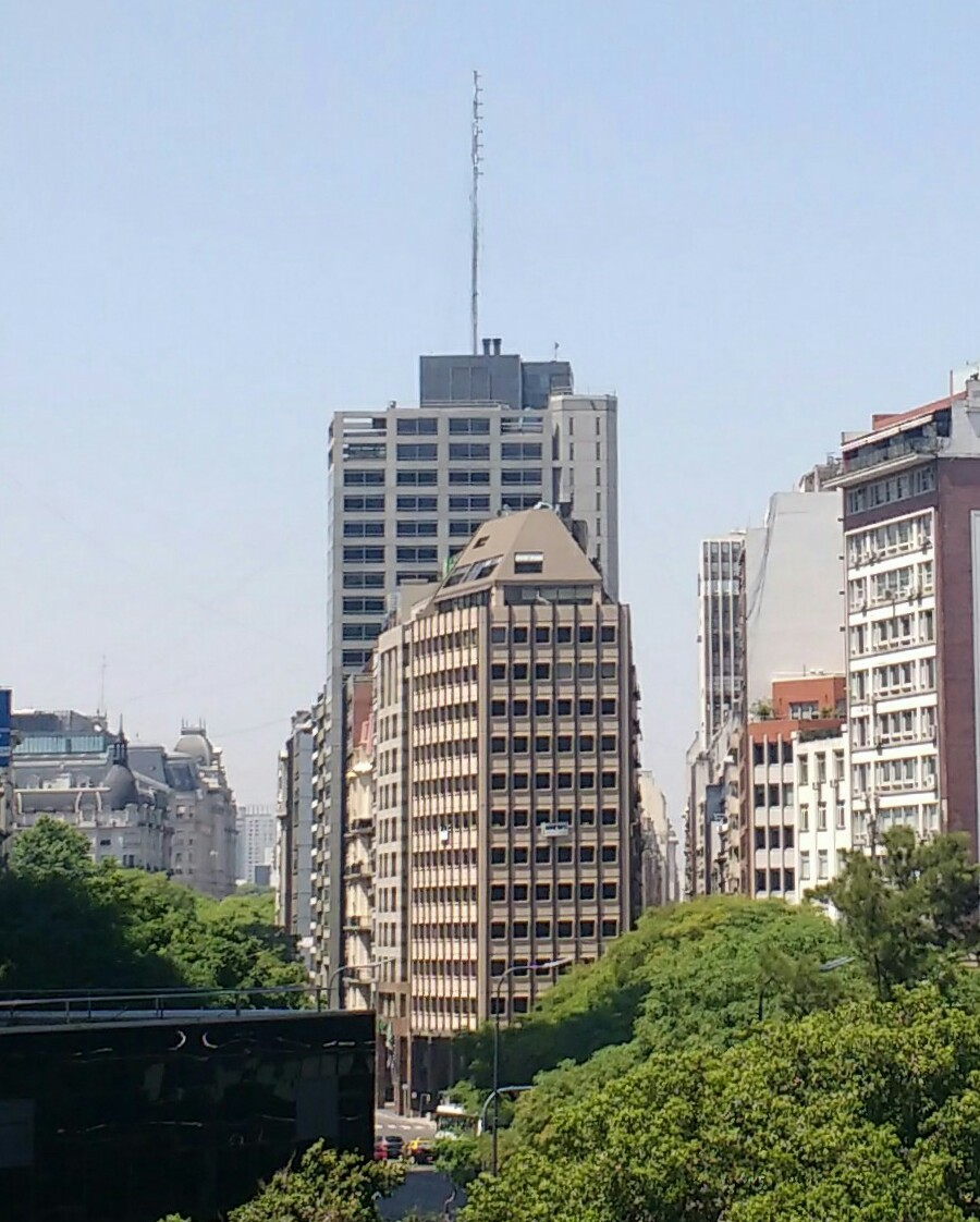 Vista de edificios de oficinas sobre la bifucación entre la Avenida Leandro Alem y la Calle 25 de mayo, El Edificio Proa (Estudio Eduardo Saiegh y Asoc, 1975) se ve en el primer plano de la foto.